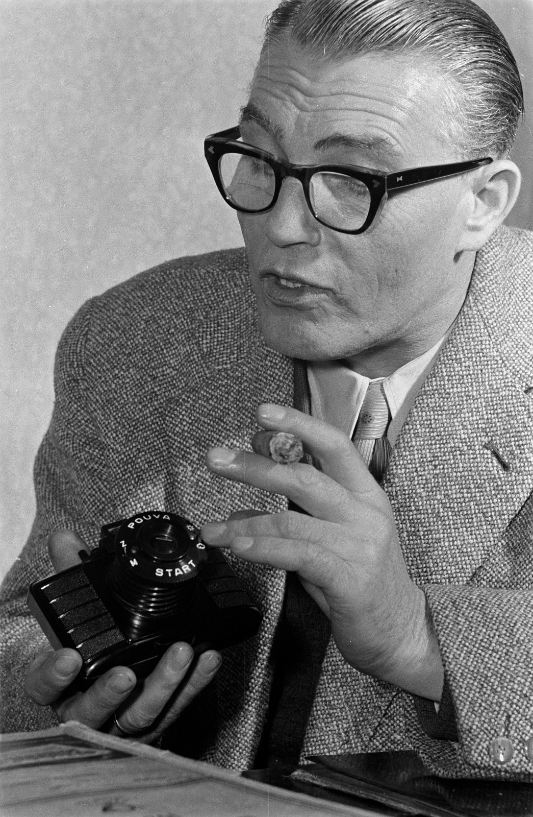 Karl Pouva mit seiner Pouva Start; photographiert von Richard Peter jun. im Jahre 1951